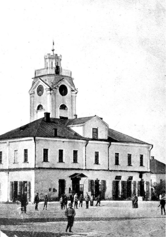 Ратуша в Велиже Беларуская (тарашкевіца): Ратуша ў Вяліжы